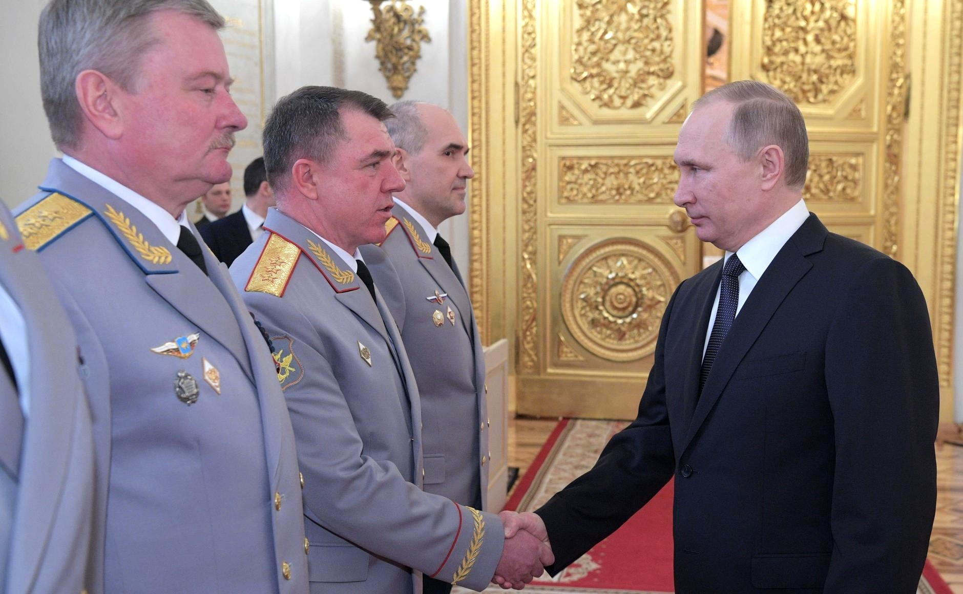 Встреча Президента России Владимира Путина с офицерами, назначенными на высшие командные должности